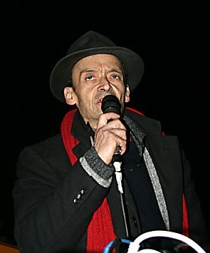 Oreste Scalzone